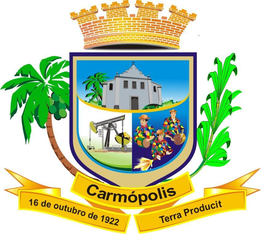 Brasão municípío de Carmópolis